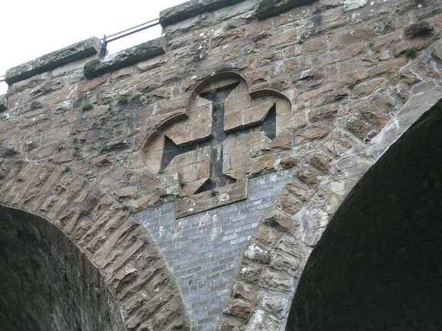 Kielder Viaduct Detail